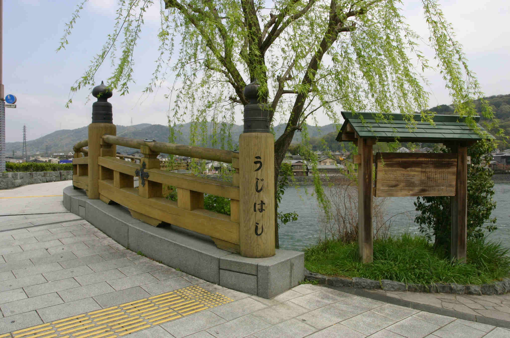 Uji bridge